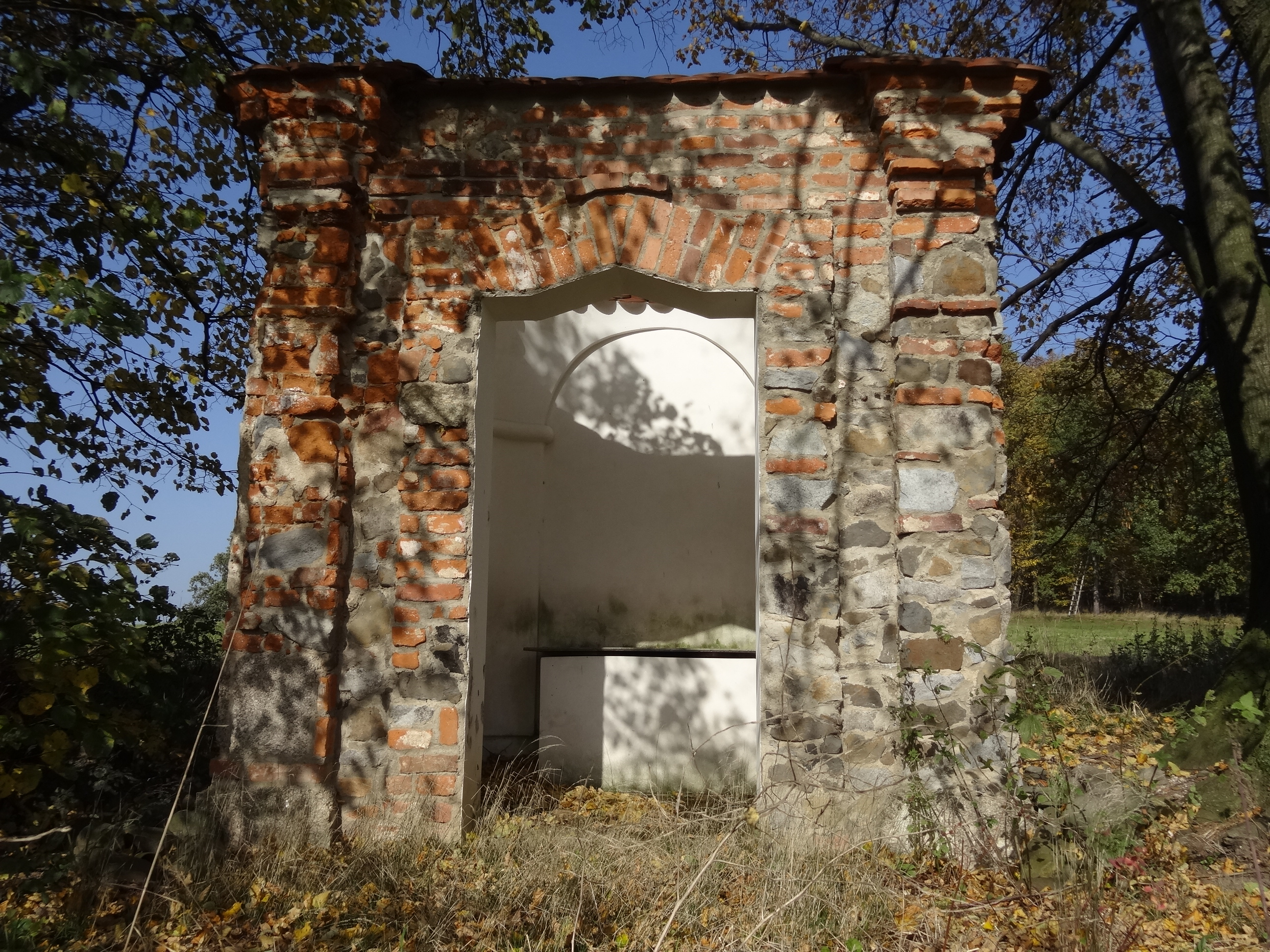 Kaple Bolestné Panny Marie, pp. 1251/1, Kunratice (okres Liberec).